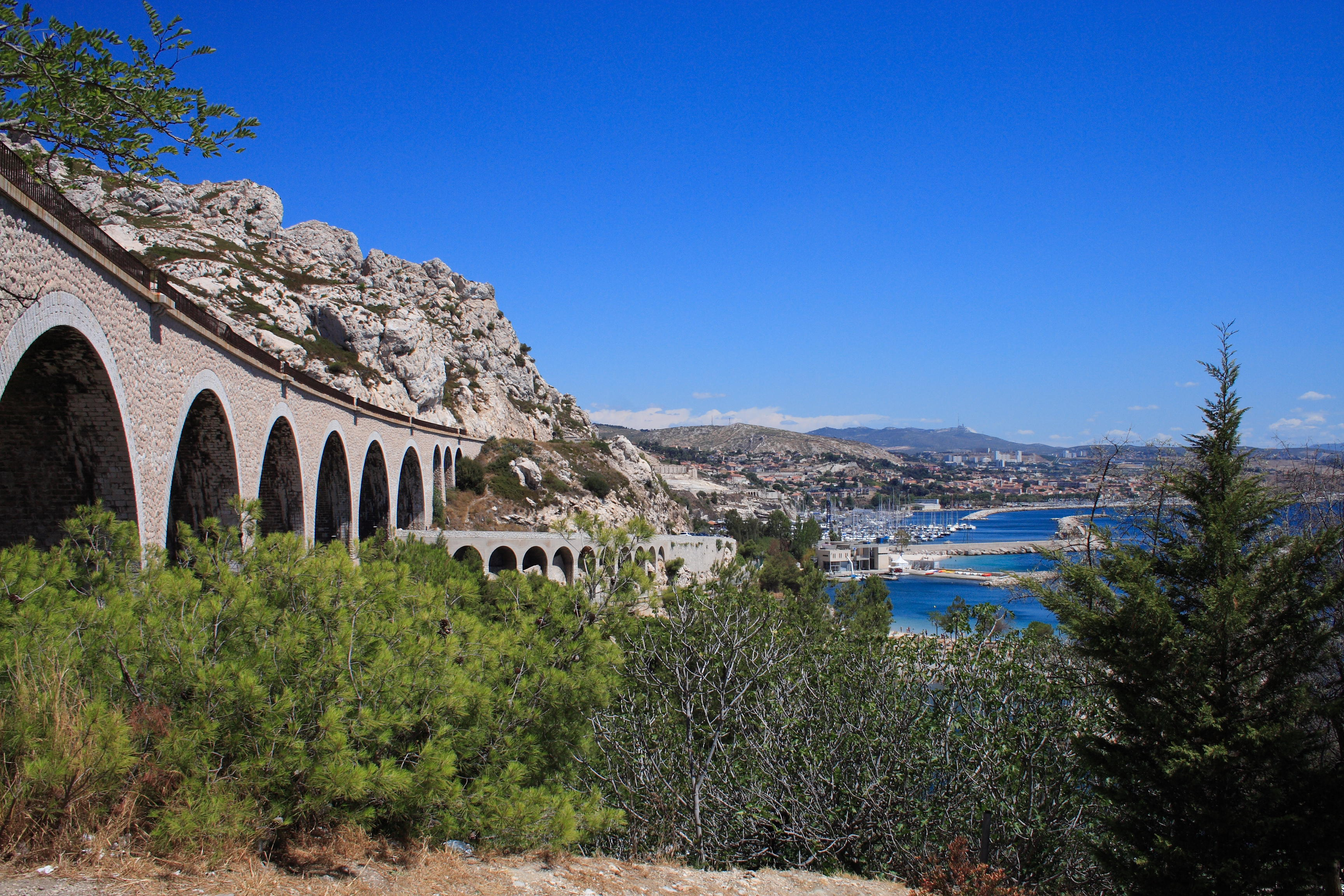 Estaque(Marseille, France)